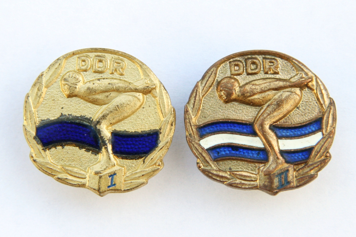 Schwimmabzeichen DDR, Stufen 1 und 2, Höhe der Abzeichen 20 mm